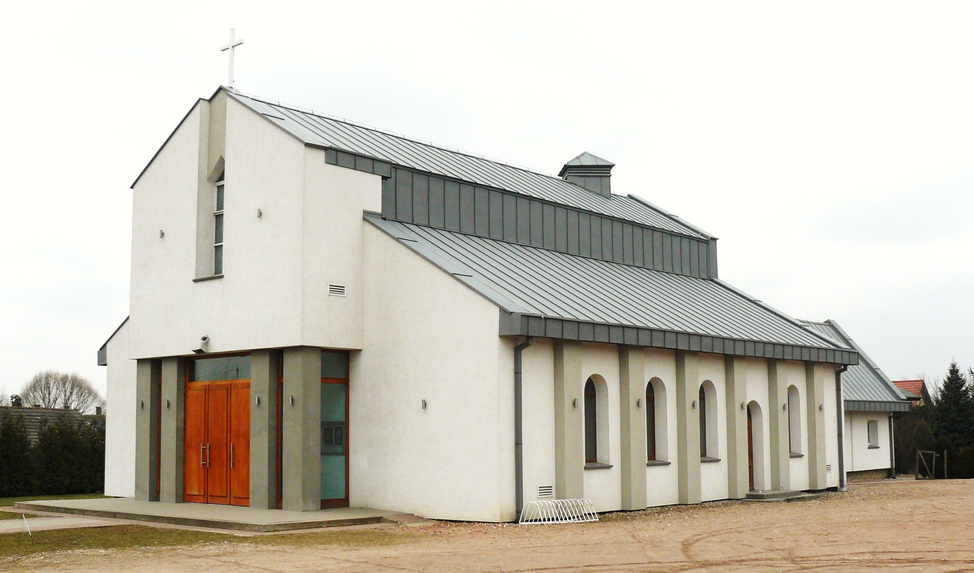 Biskupice Wlkp. Kościół NMP.